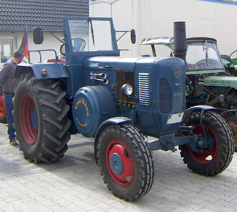 Lanz-Bulldog bei der Treckerparade beim Wirtschaftstag in Monschau-Imgenbroich (Eifel, Deutschland)